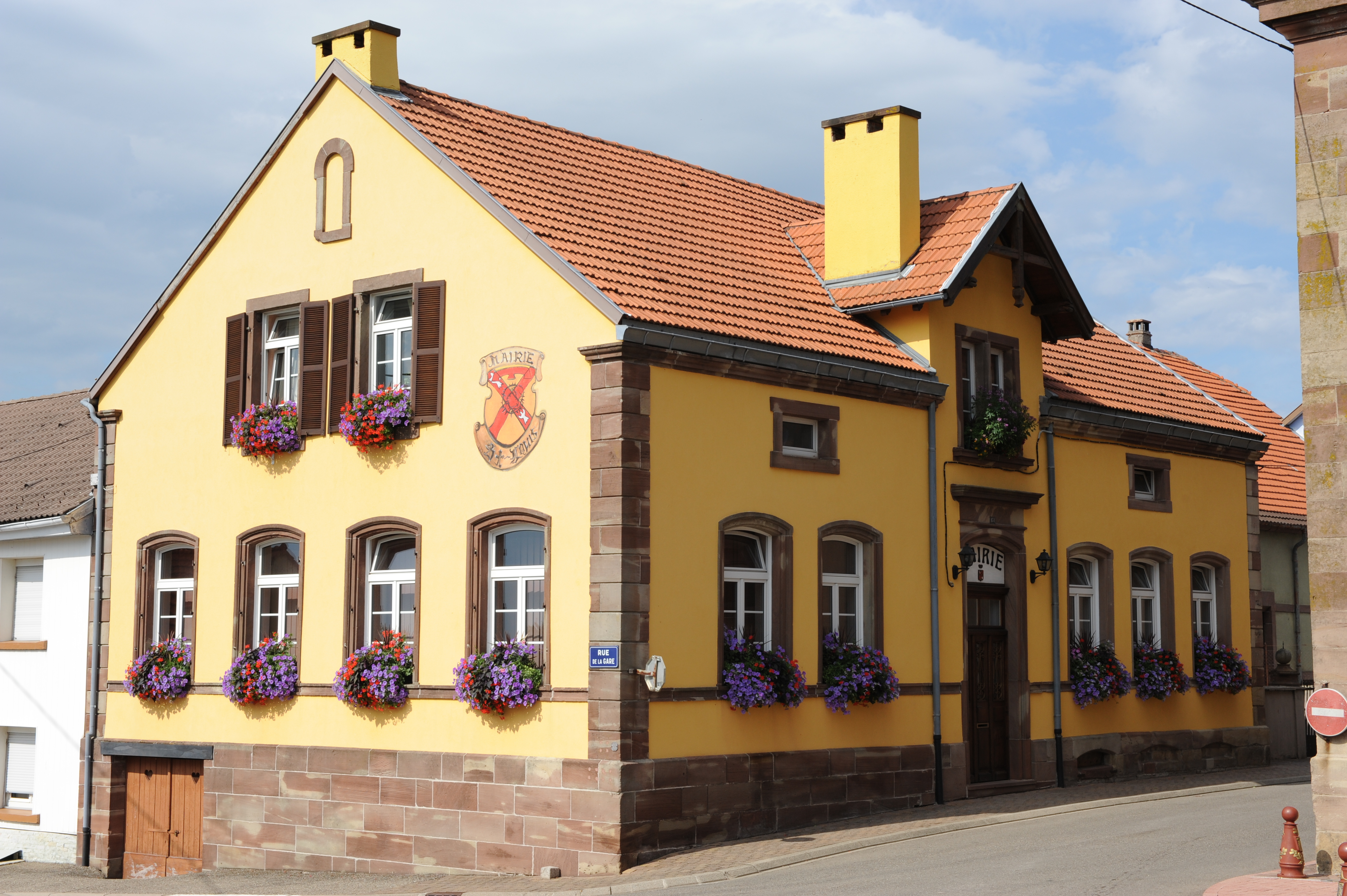 mairie